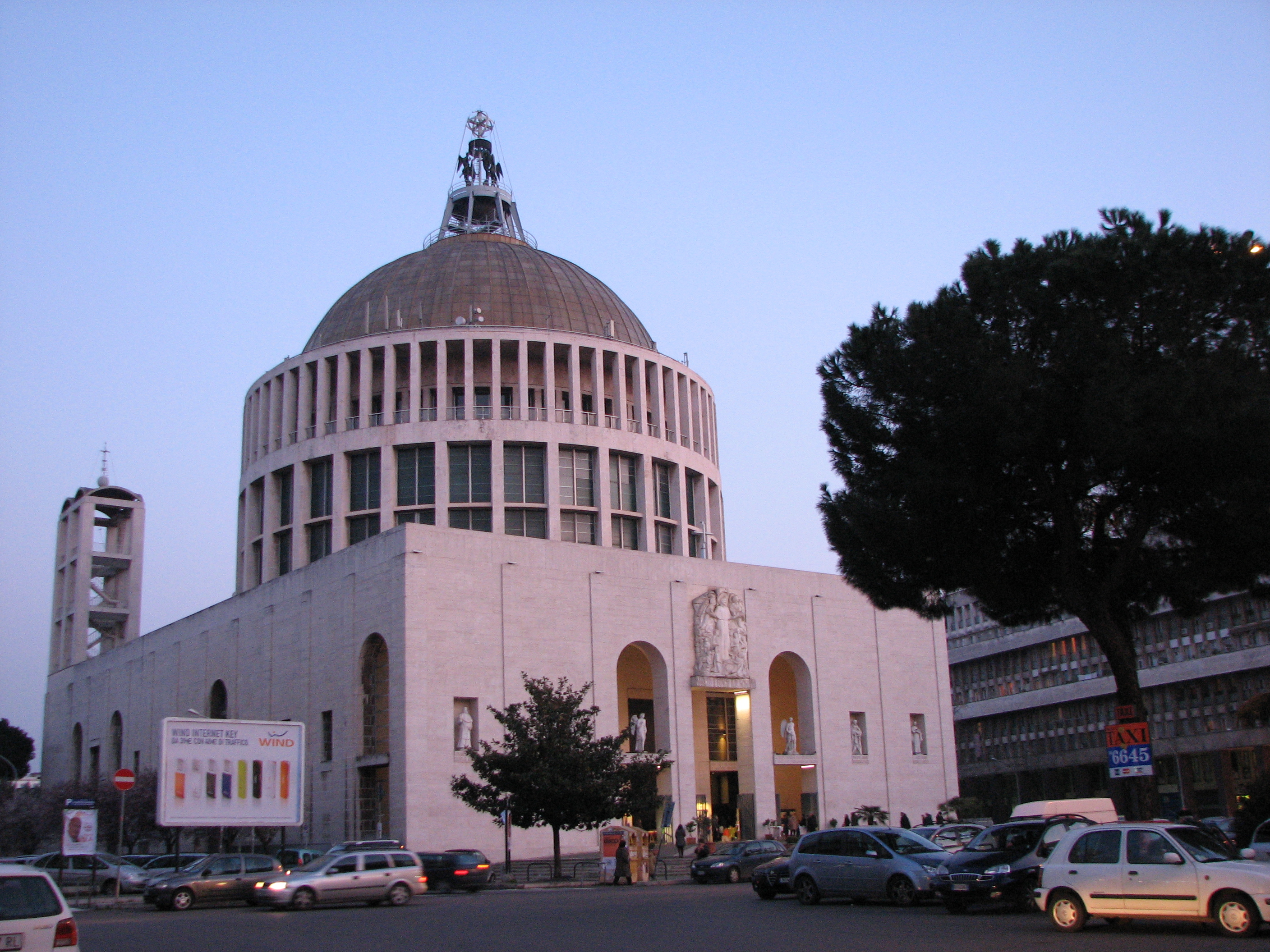 Parrocchia di San Giovanni Bosco